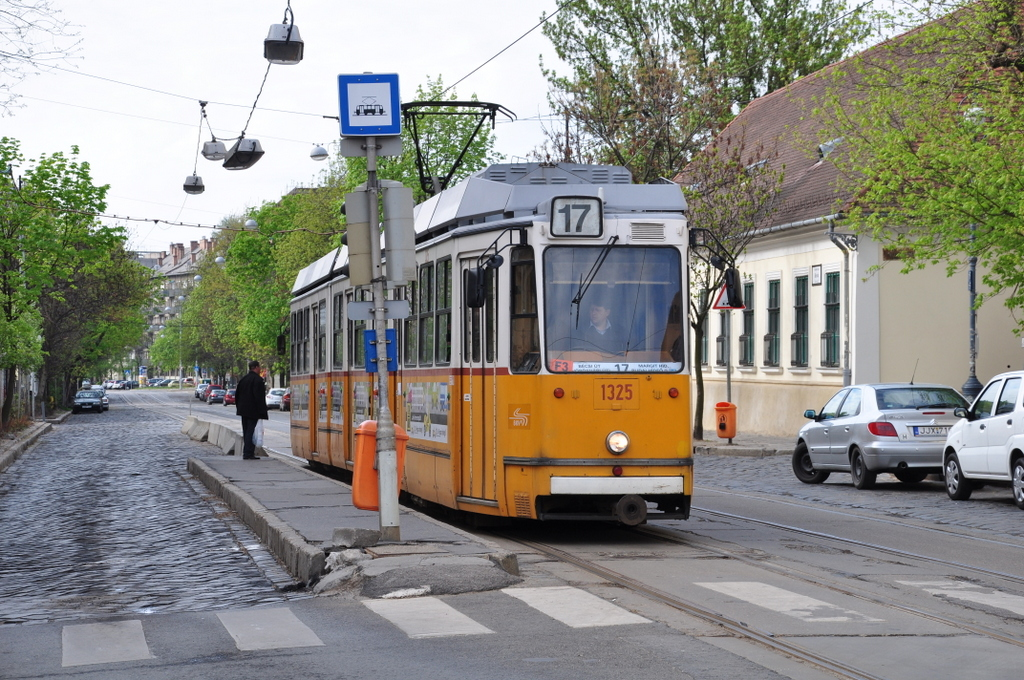 17-es villamos, Budapest